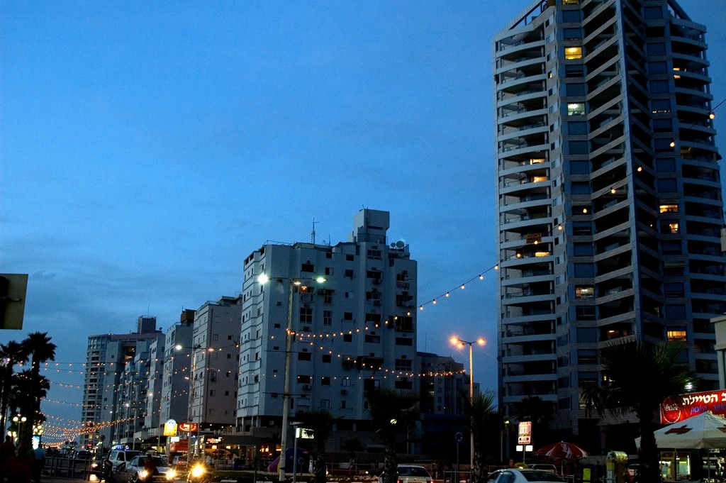 Bat Yam, IsraelBat-Yam evening